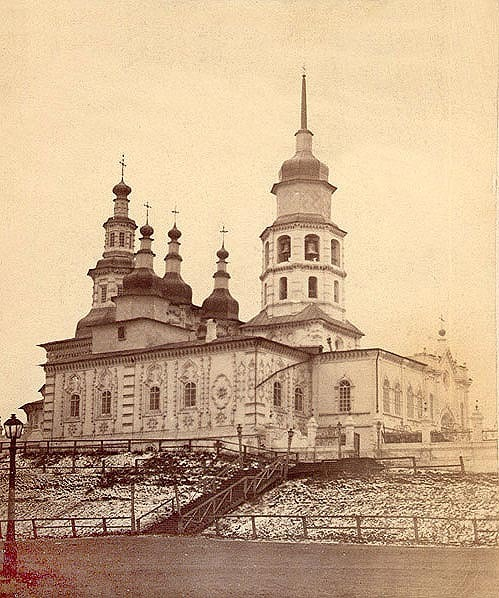 г. Иркутск. Крестовоздвиженская церковь фото 1890 г.